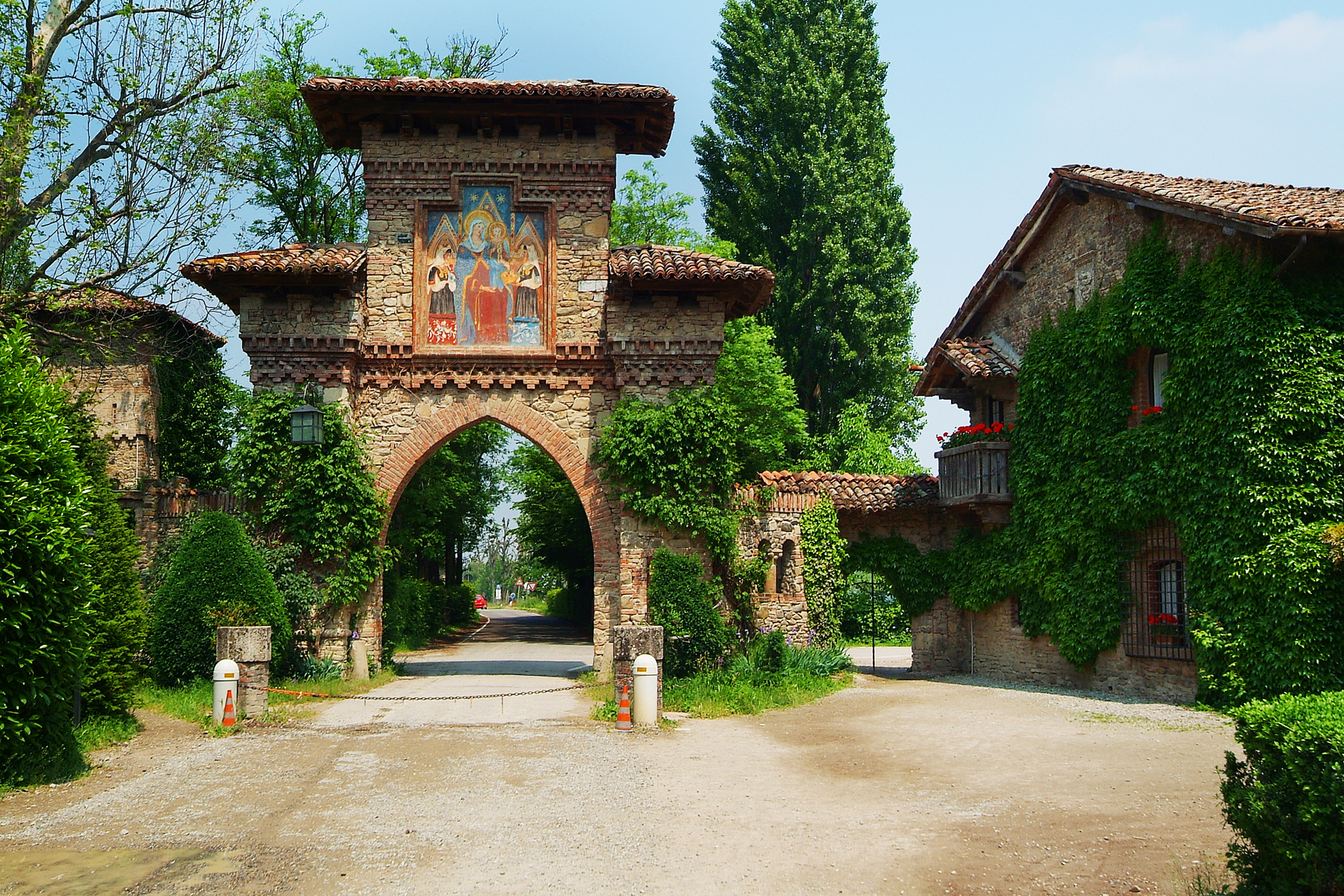 Entrata Borgo Medioevale di Grazzano Visconti